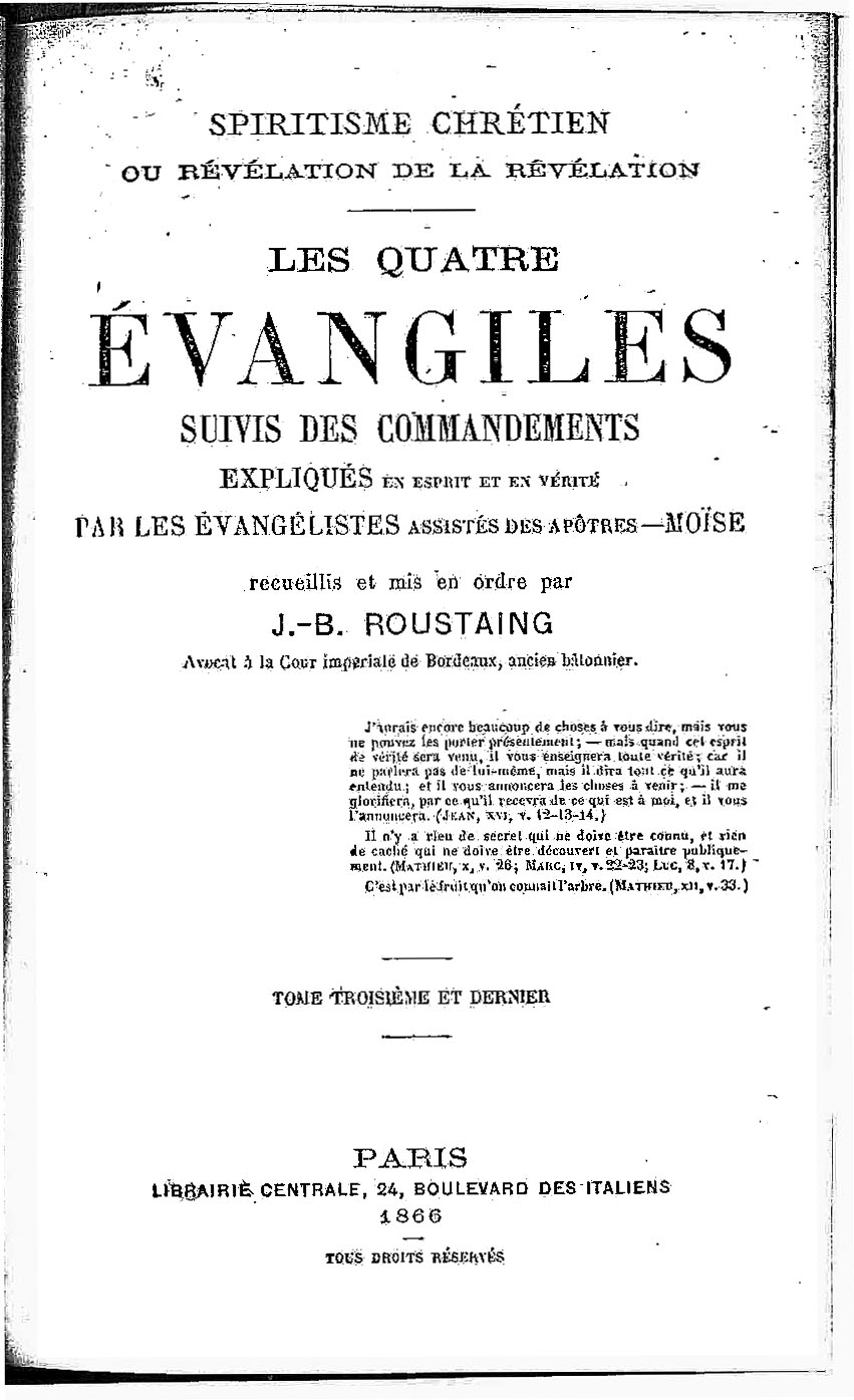 Obra psicografada pela médium Émilie Collignon, de autoria dos evangelistas e Moisés, coordenada por Jean-Baptiste Roustaing e publicada em 1866, em Paris.